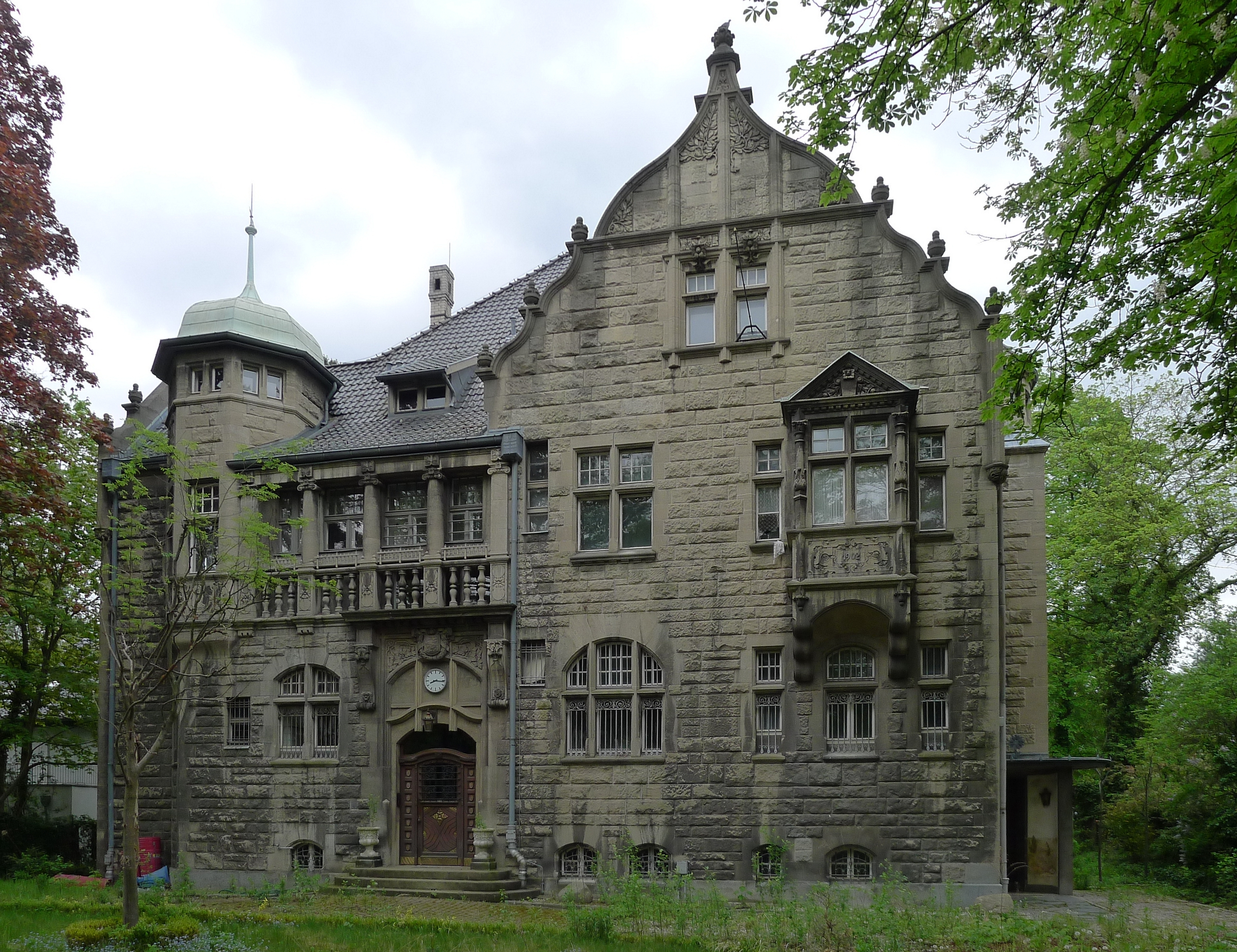 Villa Noelle in Berlin-Grunewald, Winkler Straße 10; erbaut 1901-1902 für den Unternehmer Ernst Noelle nach Entwurf der Berliner Architekten Hermannn Solf und Franz Wichards; unter Denkmalschutz